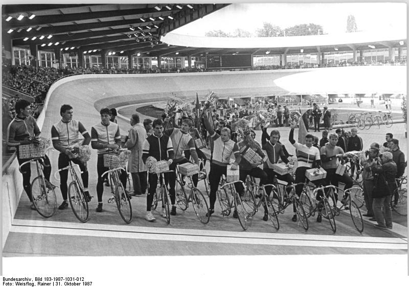 Cottbus, Radrennbahn, Eröffnung ADN-ZB Weisflog 31.10.87 Cottbus:Wiedereröffnung der rekonstruierten Rennbahn. Zu einem ungewöhnlichen Zeitpunkt gab sich am 31.10.87 noch einmal die komplette DDR-Elite des Radsport in Cottbus ein Stelldichein. Anlaß war die feierliche Wiedereröffnung der rekonstruierten Rennbahn am letzten Tag im Okotber, verbunden mit der Ehrung der Medaillengewinner der diesjährigen Weltitelkämpfe und der siegreichen Friedensfahrt-Mannschaft des Jahrgangs 1987.